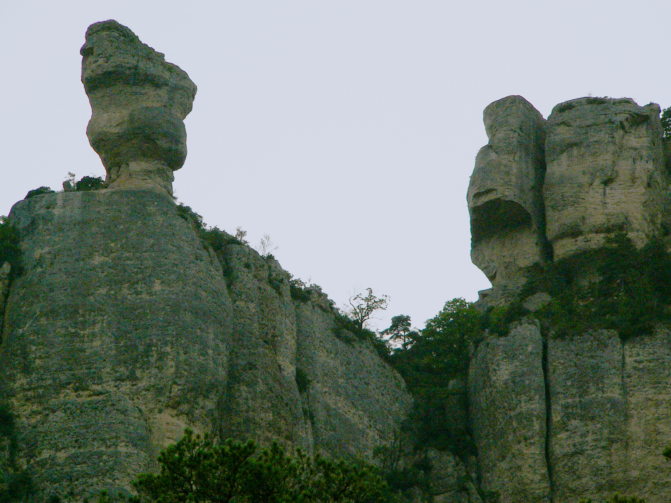 Gorges de la Jonte